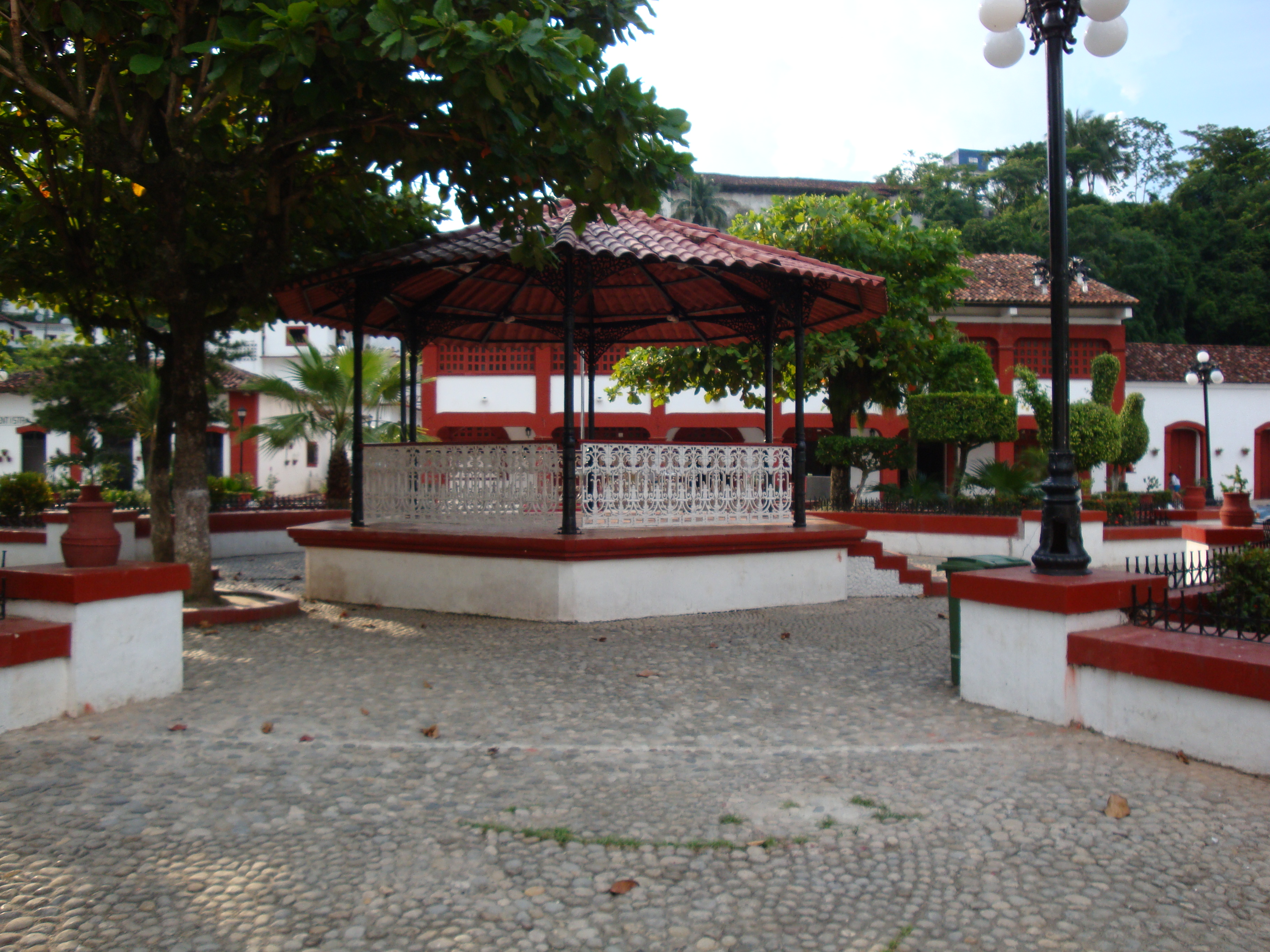 Kiosco del parque principal de Tapijulapa, Tabasco.